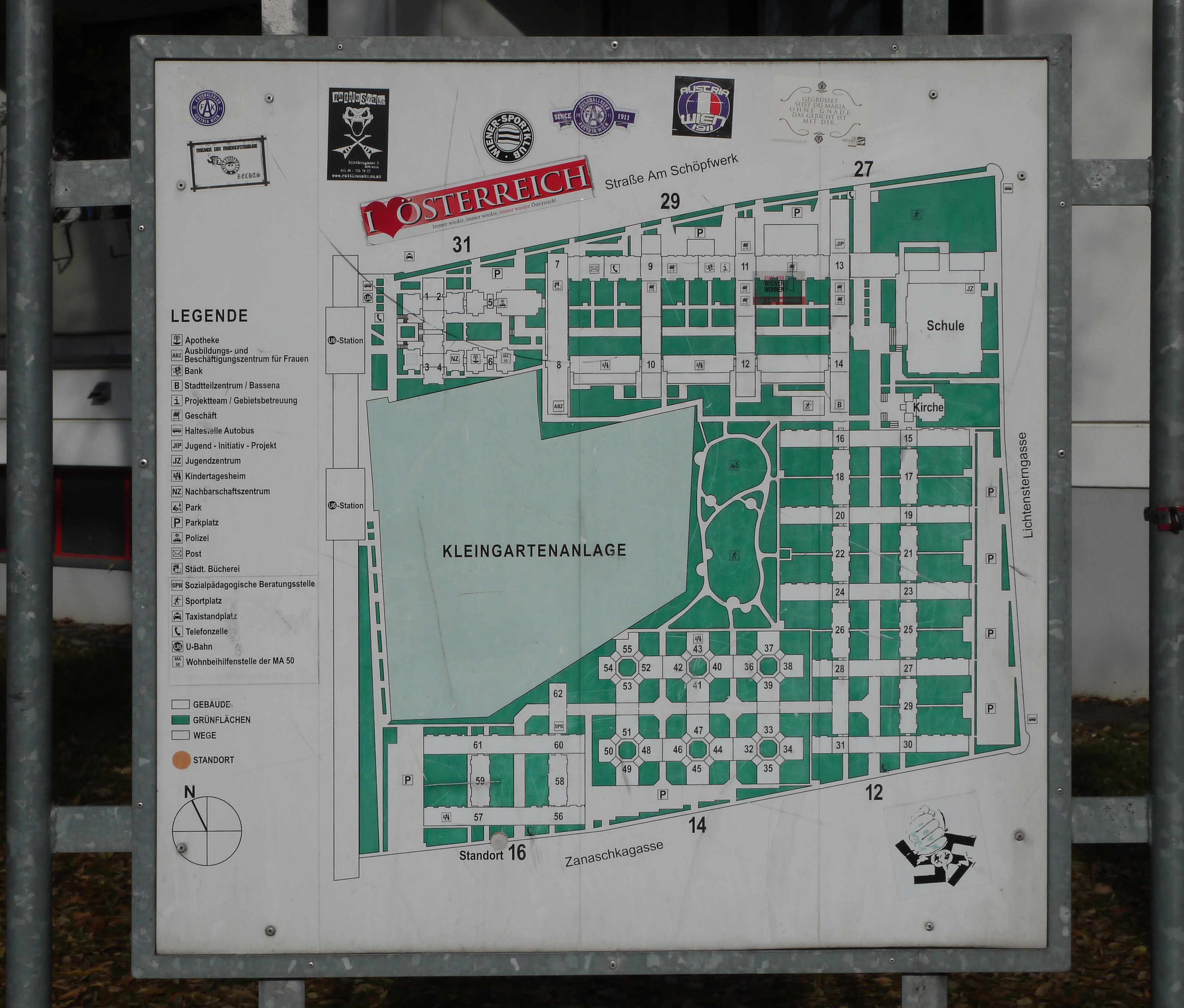 Am Schöpfwerk